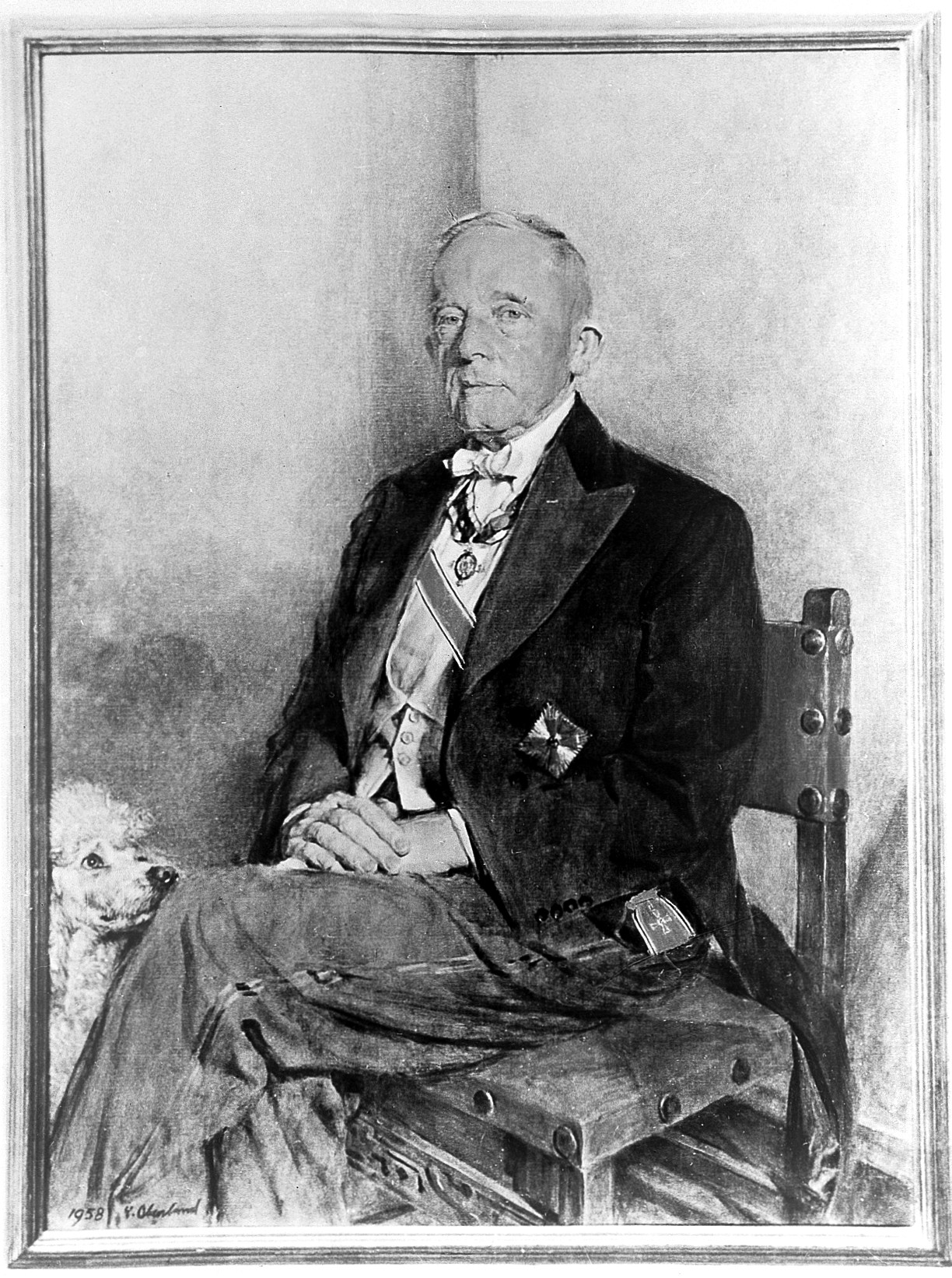 Otto Heinrich Warburg Wellcome Images